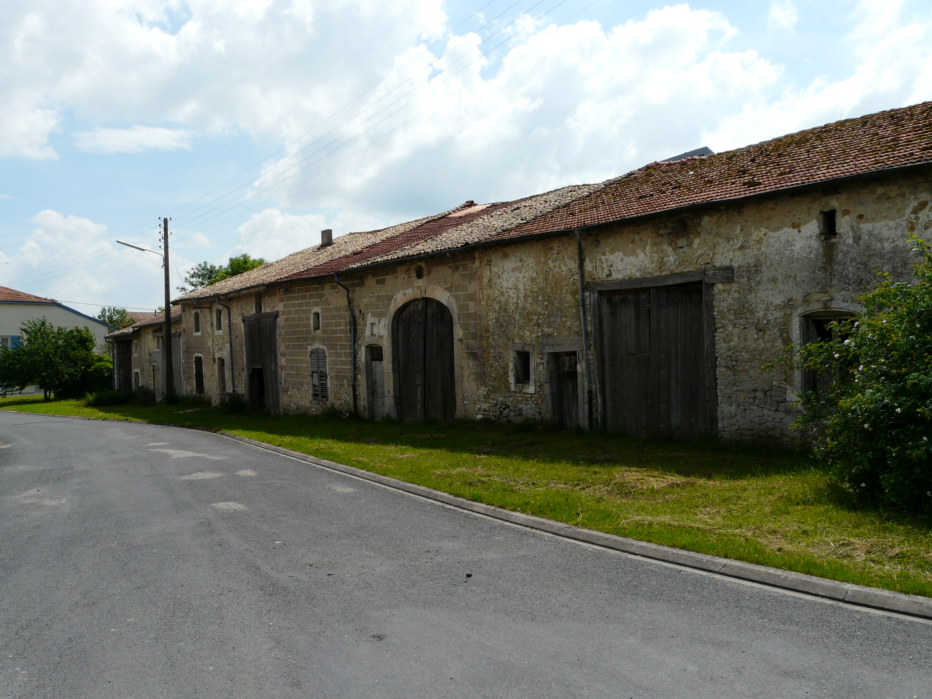 Fermes lorraines typiques à Naives-en-Blois (Meuse, France)